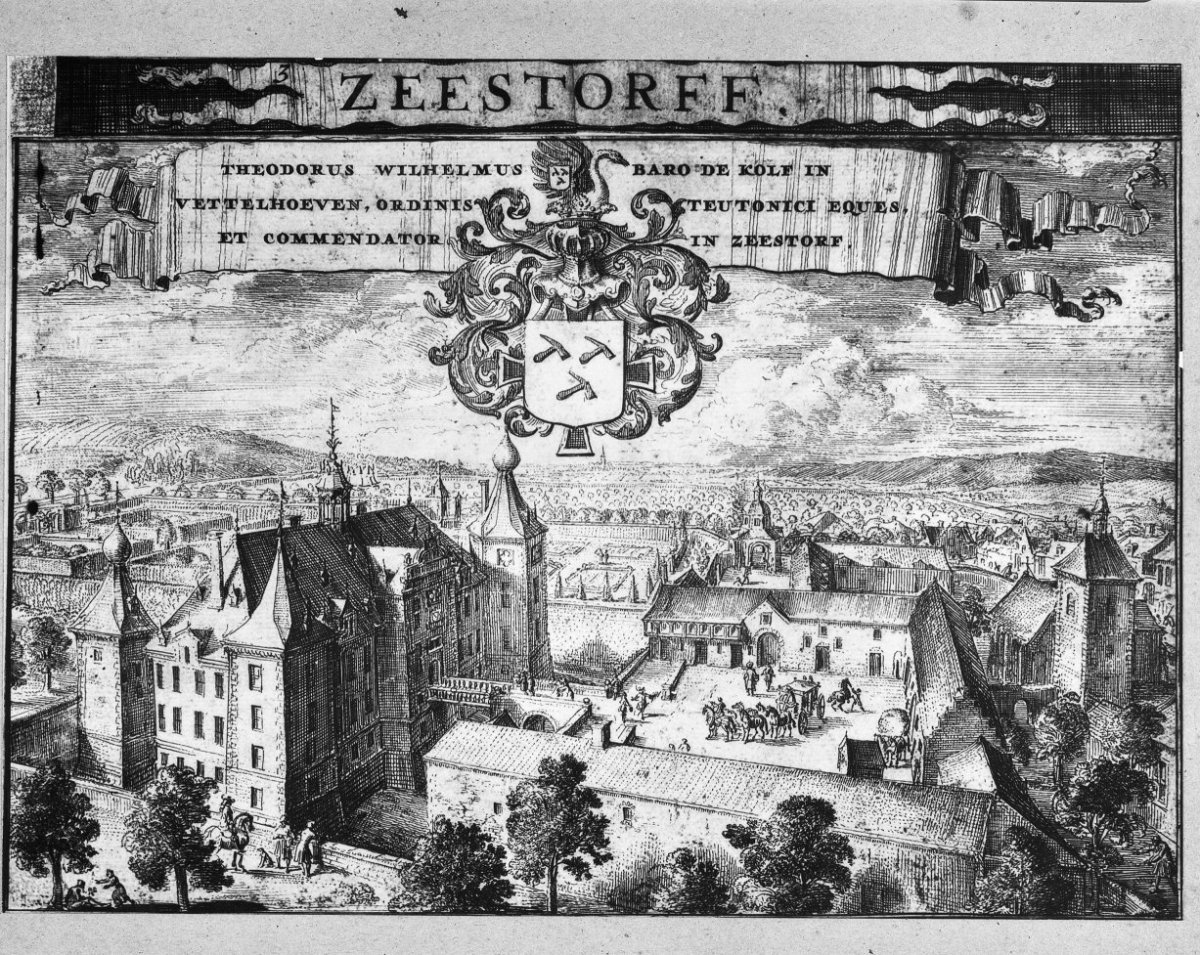 Ets: Ets met kasteel (opmerking: Ets door Rom. de Hooghe in prentenkabinet van de Abdij Godsdal (Val Dieux) te Aubel (België))